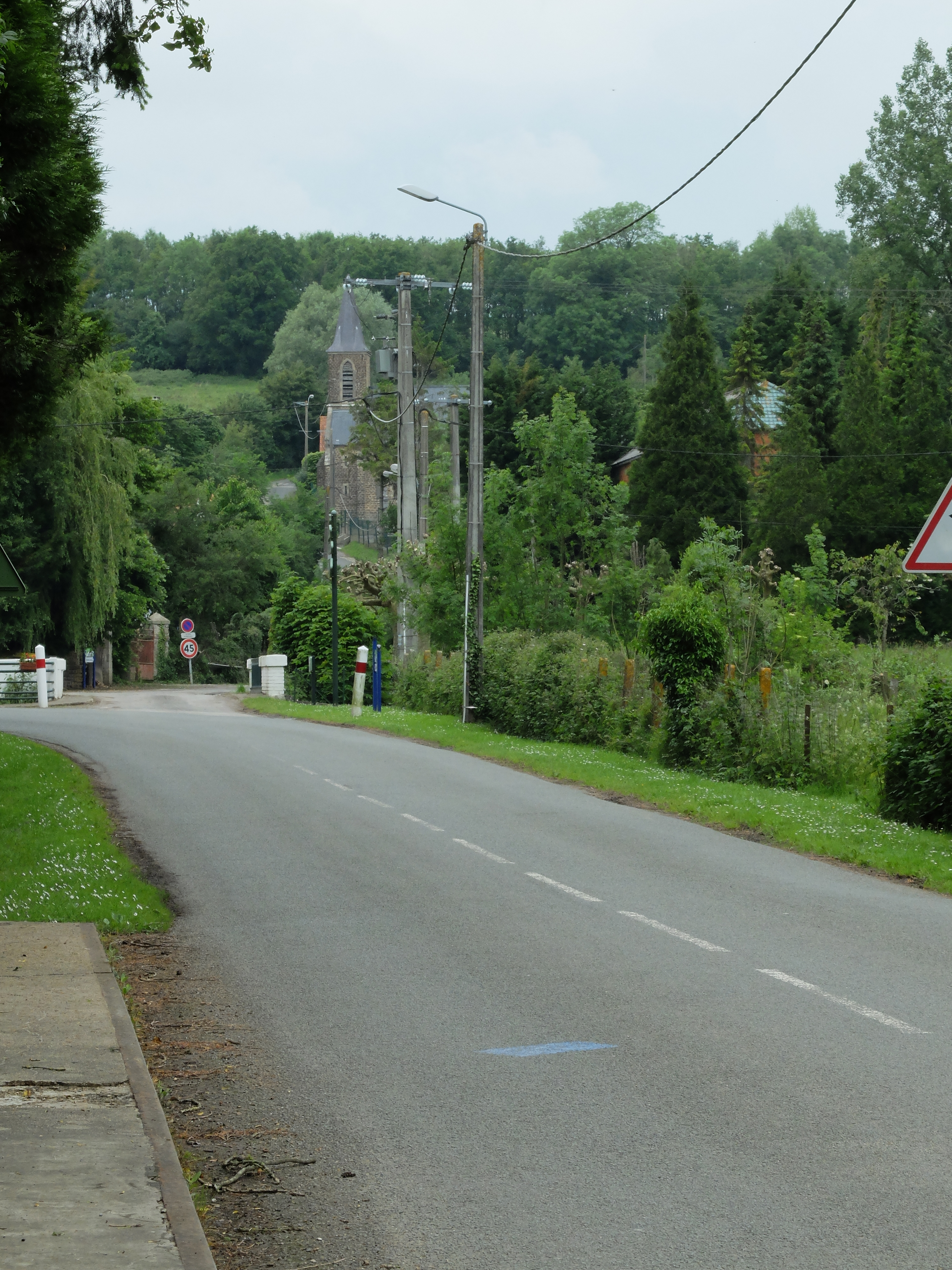 Vue de Bournonville depuis la mairie et vers l'église.